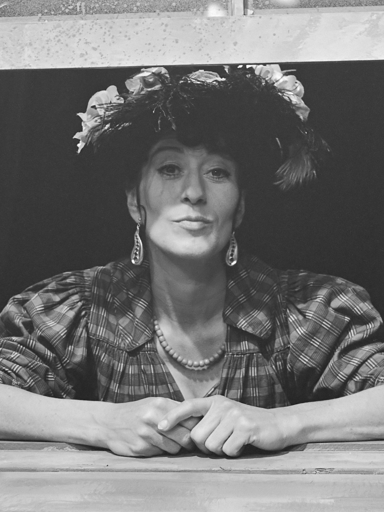 Boefje in 1964 op televisie. Hetty Berger als floddermadam 20 september 1963